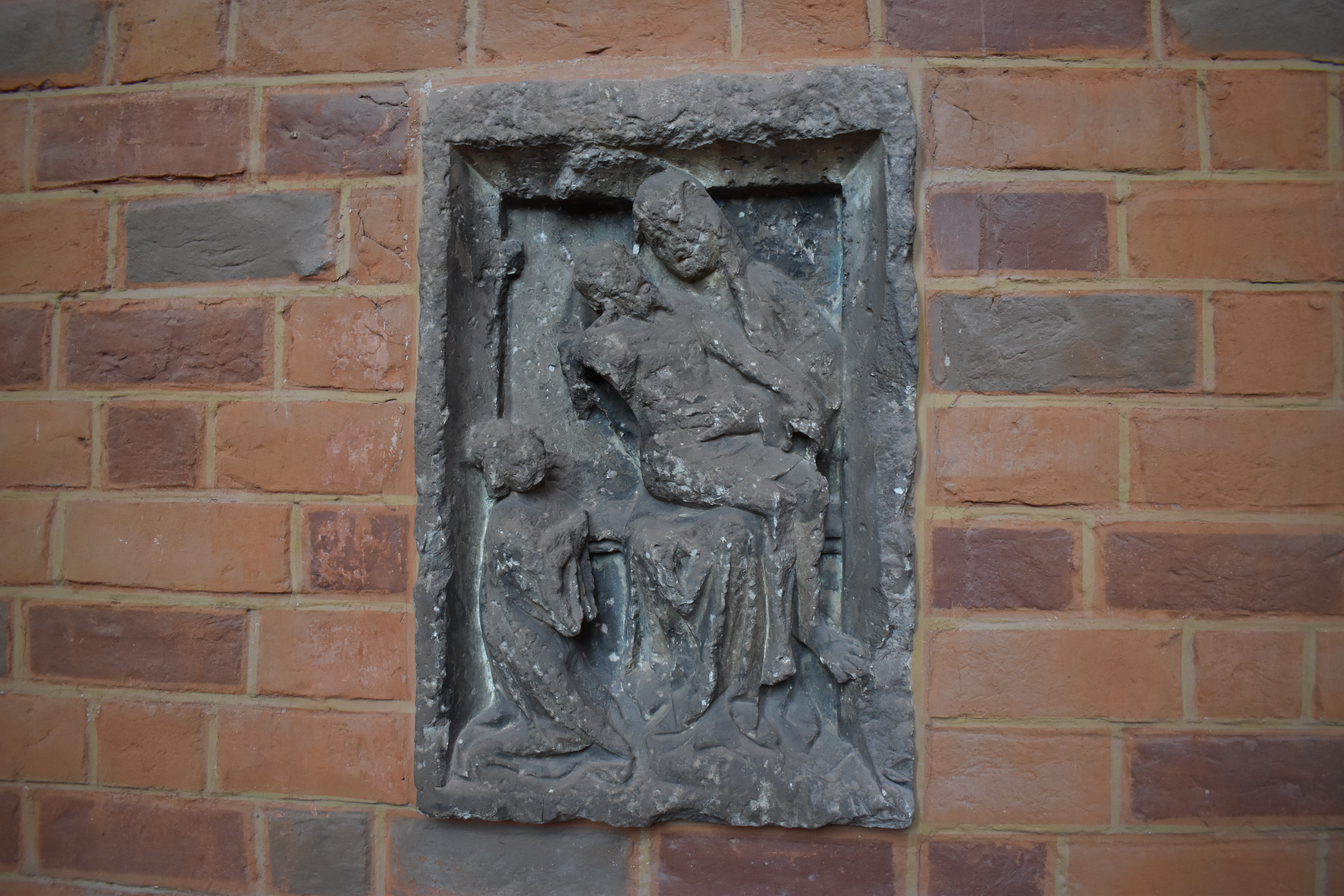 Eins von sechs Sandsteinreliefs, Pieta mit Stifterfigur, Ende 14. Jhd., heute im Chrorraum, bis 1906 außen am nordöstlichen Turm.